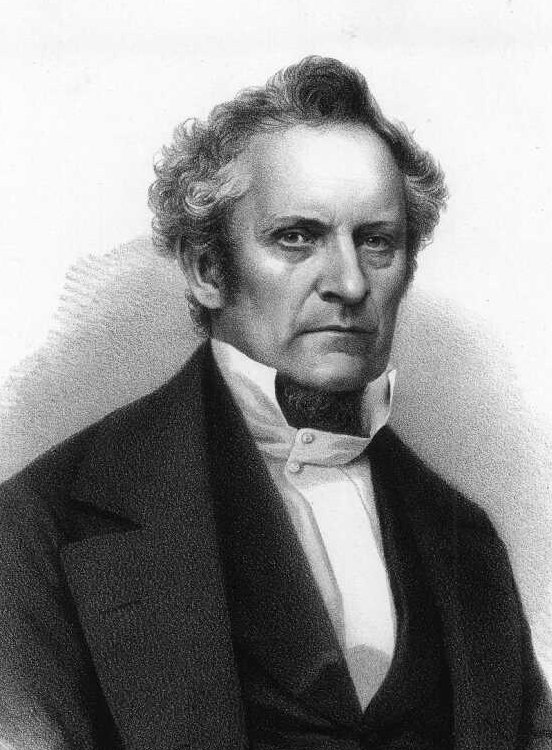 Julius Plücker